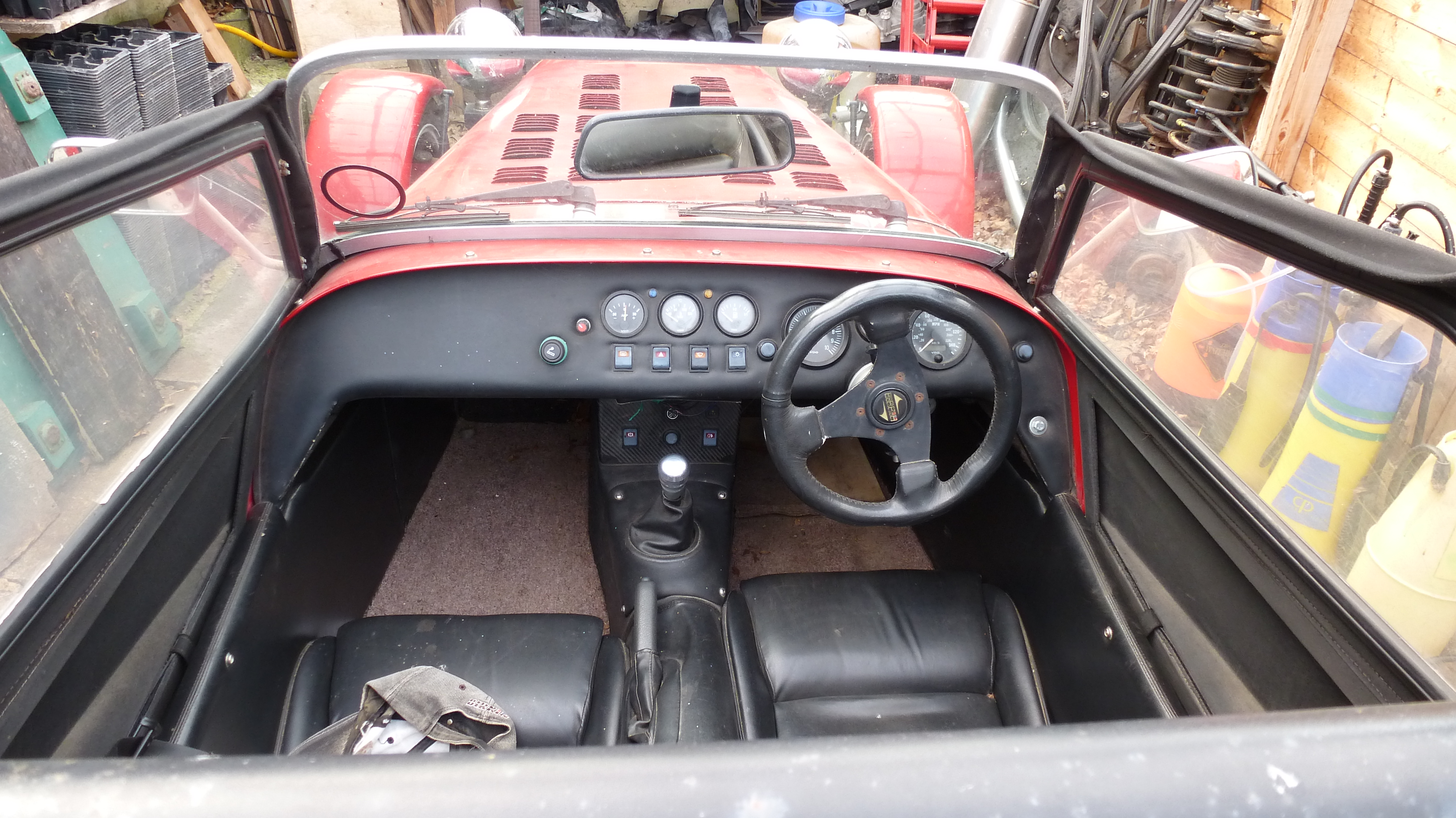 Birkin Seven Roadster Interieur